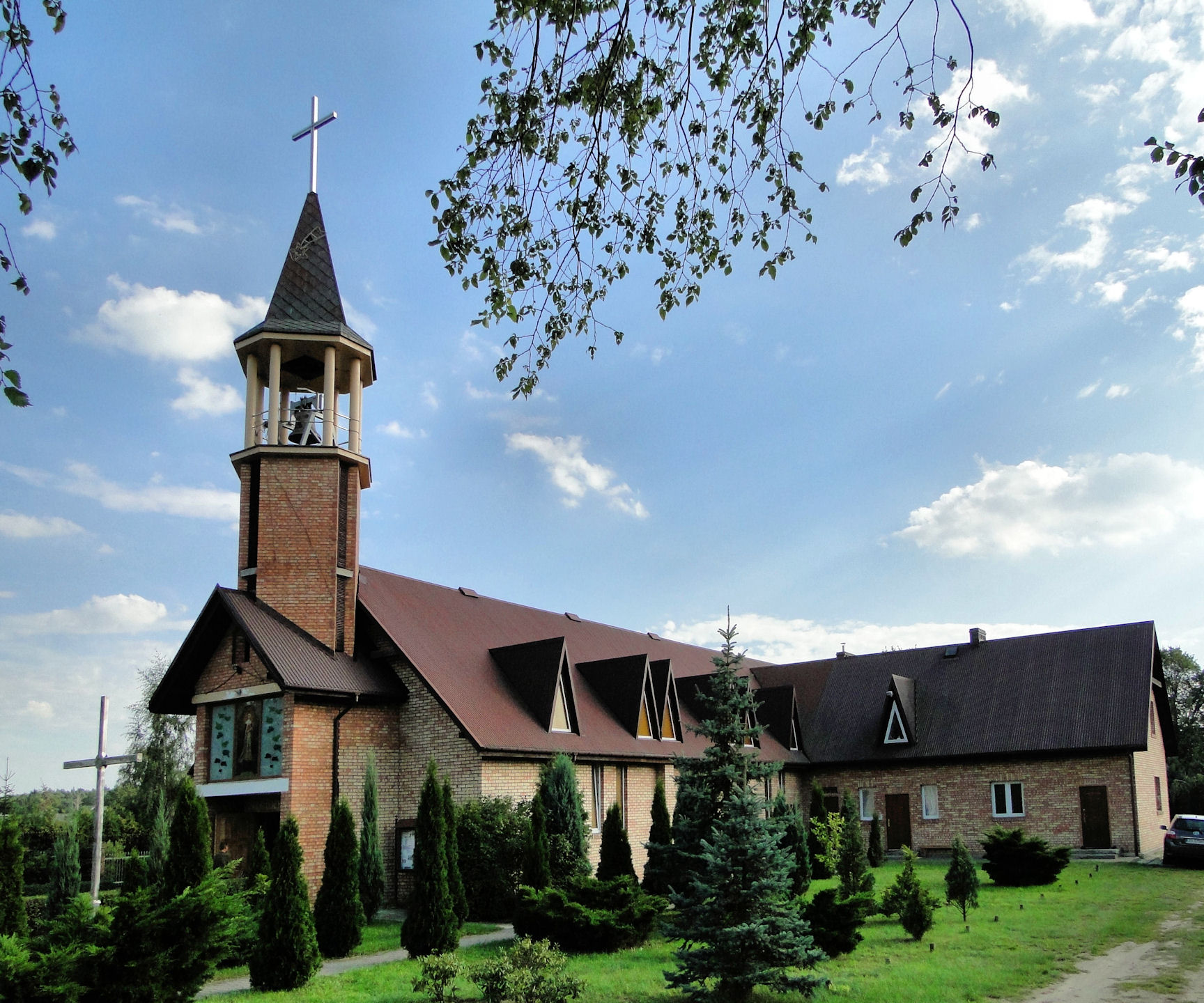 Kościół p.w. św. Jadwigi Królowej w Szczecinie Kijewie